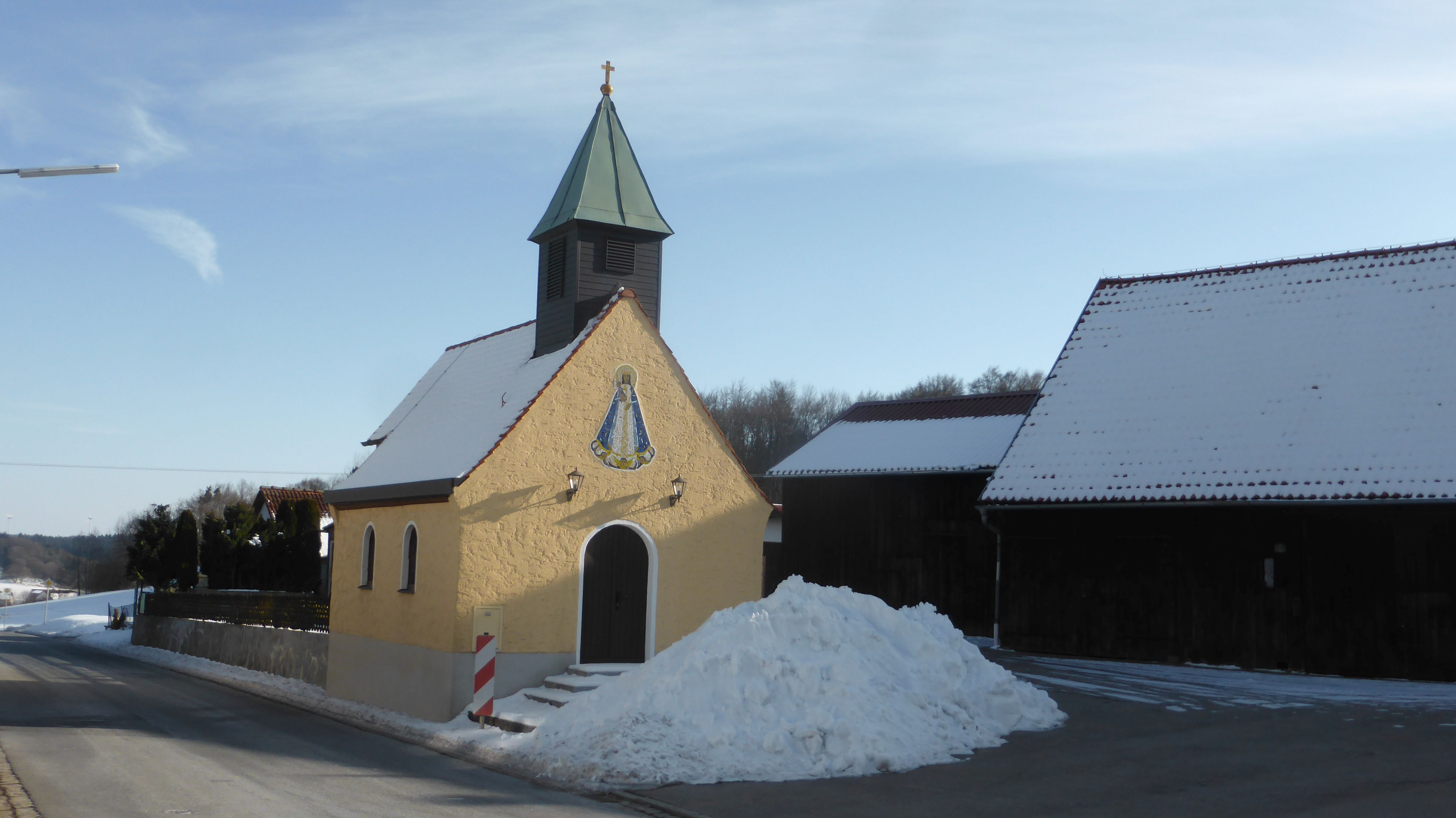 Stetten (Hohenfels), Kapelle